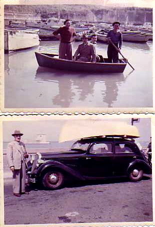 probablement le 1er bateau en plastique en France Ciraud 1950 suffisament léger pour prendre place sur le toit de l'hotchkiss familliale